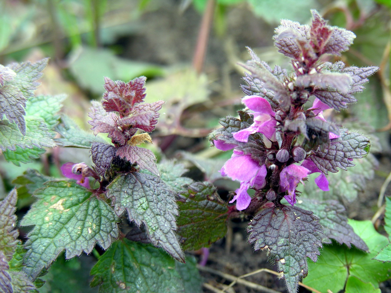 Dėmėtoji notrelė (Lamium maculatum) Šeima. Notreliniai (Lamiaceae) Foto: Algirdas, 2006 m. balandžio 29 d., Lietuva